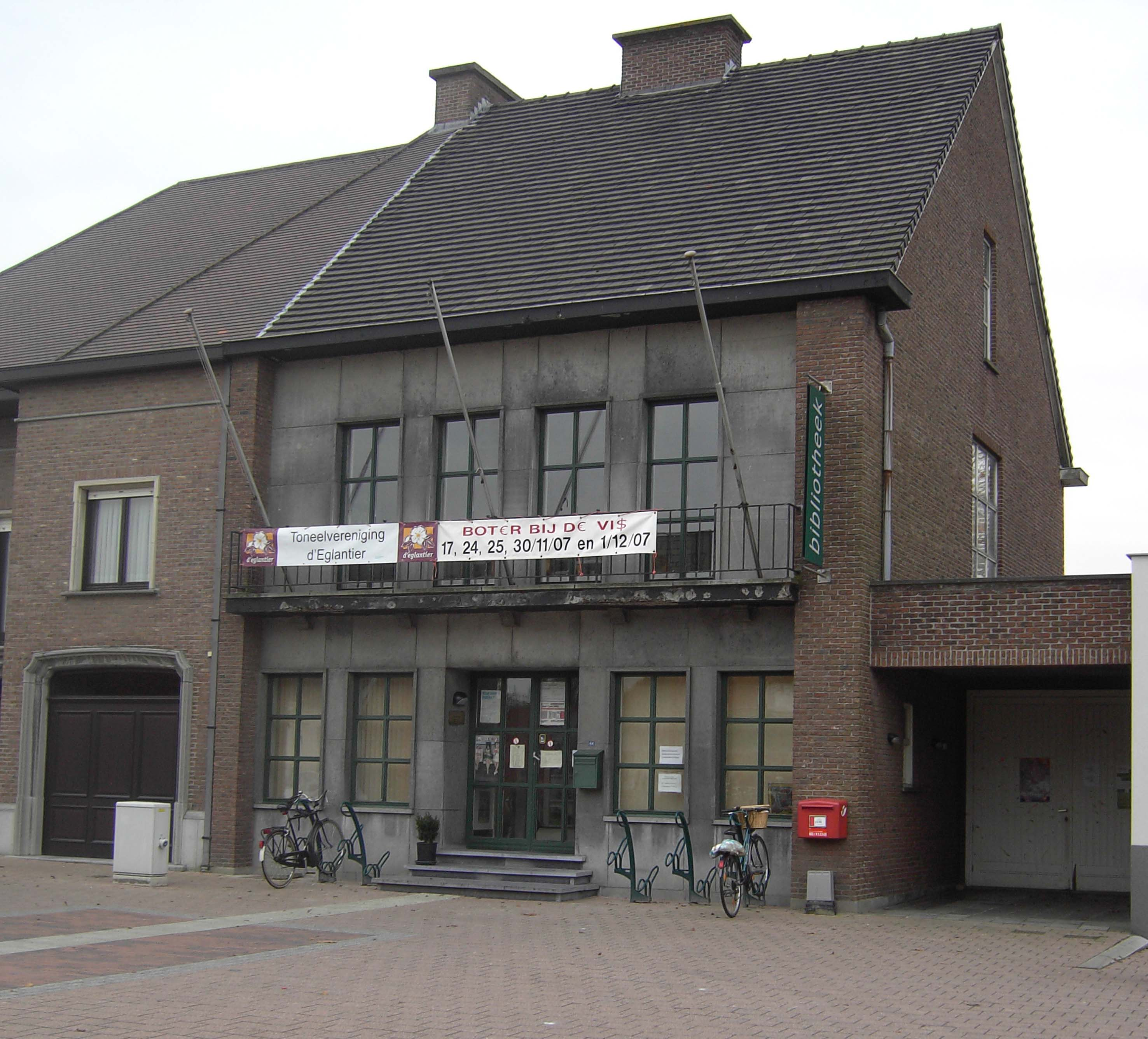 Serskamp (Wichelen) - gemeentehuis - town hall